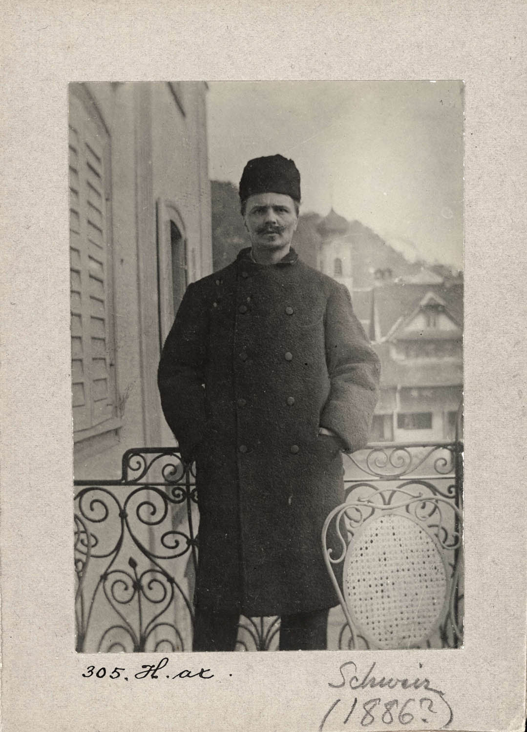 Depicted person: August Strindberg, Författare, Konstnär, Sverige (1849-01-22-1912-05-14)